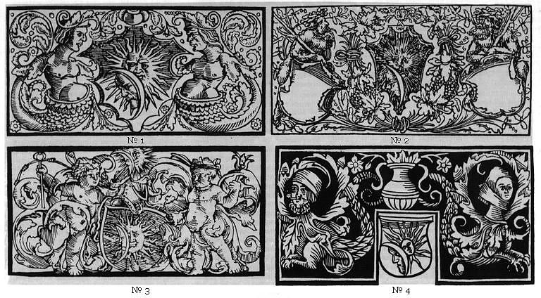 Скорина. № 1. "Русалки". Использована 8 раз: в книгах "Иисус Навин", "Второй закон", "Юдифь", "Руфь", "Судей", "Эсфирь", "Плач Иеремии", "Пророк Даниил". 106Х52/53 мм. № 2. "Дикие люди". Использована 9 раз: в книгах "Иисус Сирахов", "Екклезиаст", "Царств" (четырежды), "Исход", "Песнь песней", "Премудрость божья" (на последнем листе в качестве концовки). 106Х52/53 мм. Поля гербовых щитов изначально оставались пустыми. В некоторых экземплярах изданий в щиты вписаны от руки различные монограммы. № 3. "Младенцы". Использована 4 раза: в книгах "Песнь песней", "Премудрость божья", "Левит", "Числа". 106Х52/53 мм. № 4. "Буква П". Песни Царя Давыда еже словуть Псалтыръ. Прага, 1517. Л.5. 84Х45 мм. Техника ксилографии. Белый штрих на черном фоне.